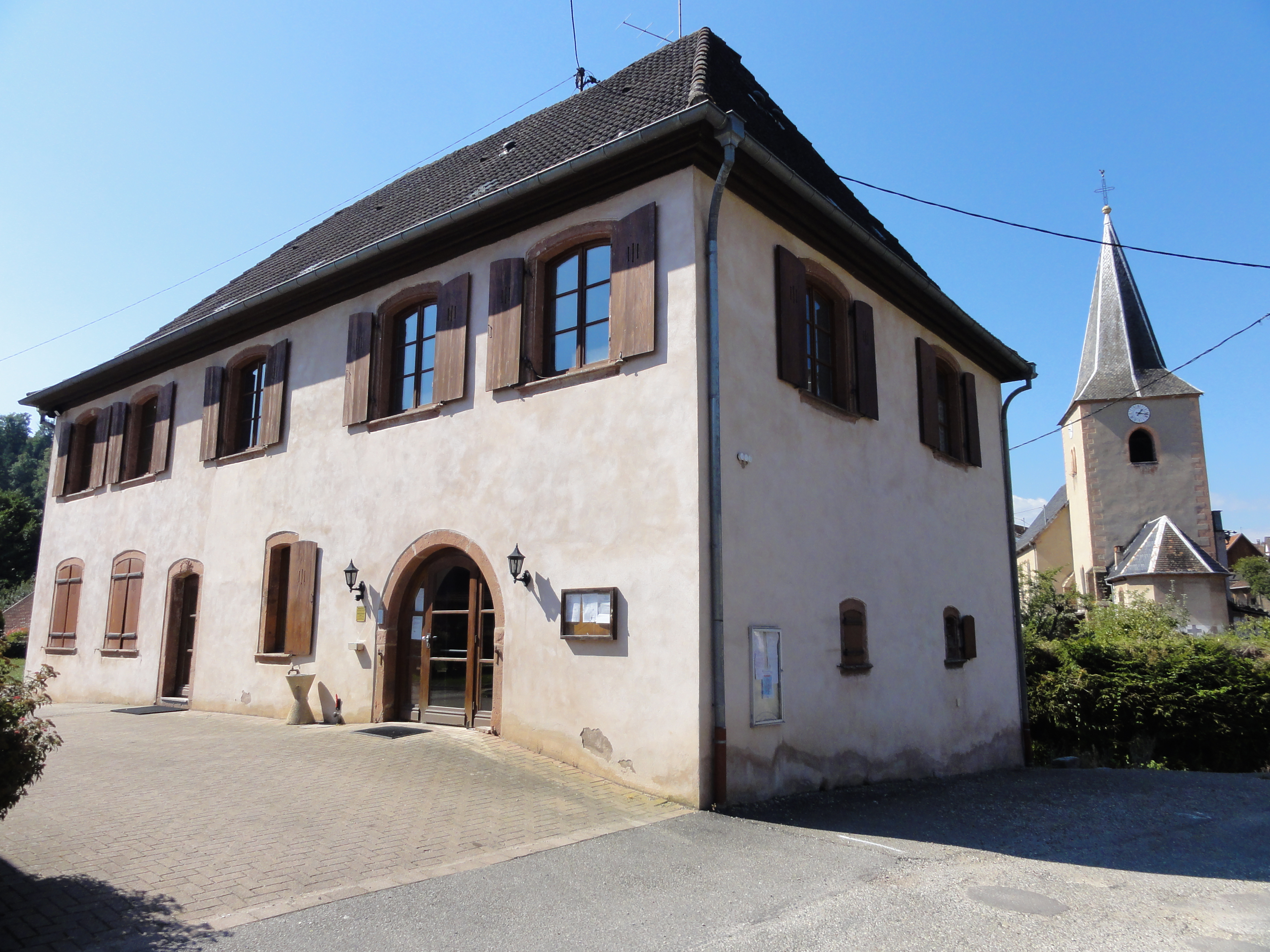 Alsace, Bas-Rhin, Saint-Martin, Ancien presbytère (XVIIIe), actuellement mairie, 10 rue de la Libération. .